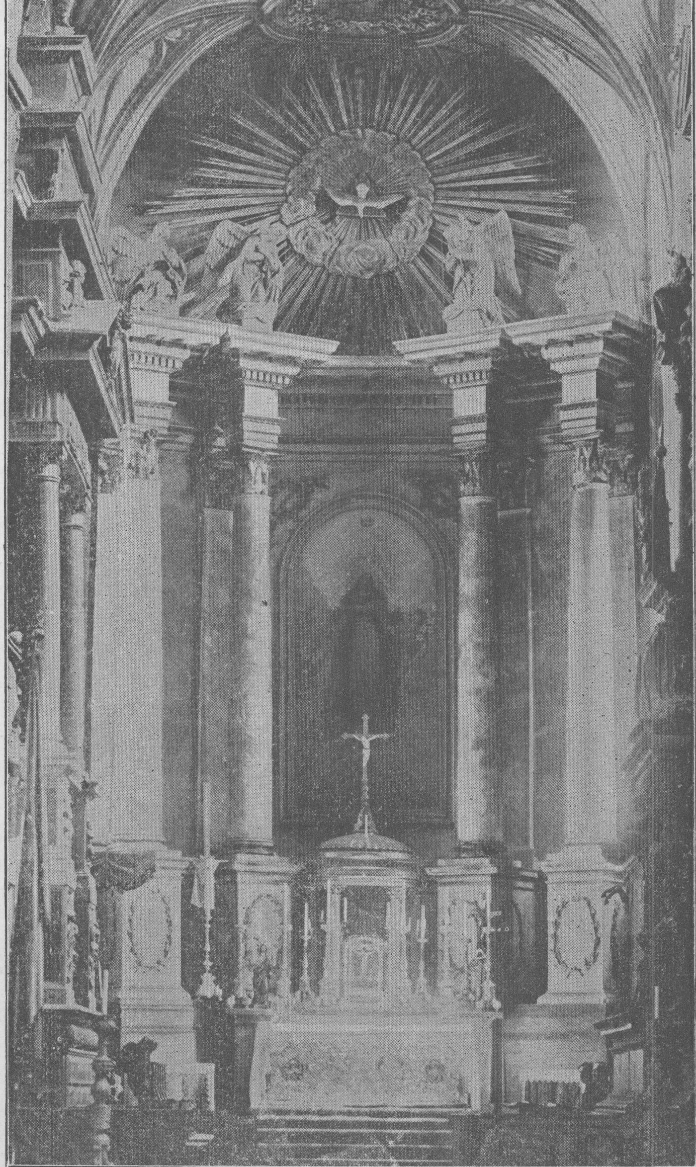 Zdjęcia prezbiterium katedry tarnowskiej przed 1889 r.